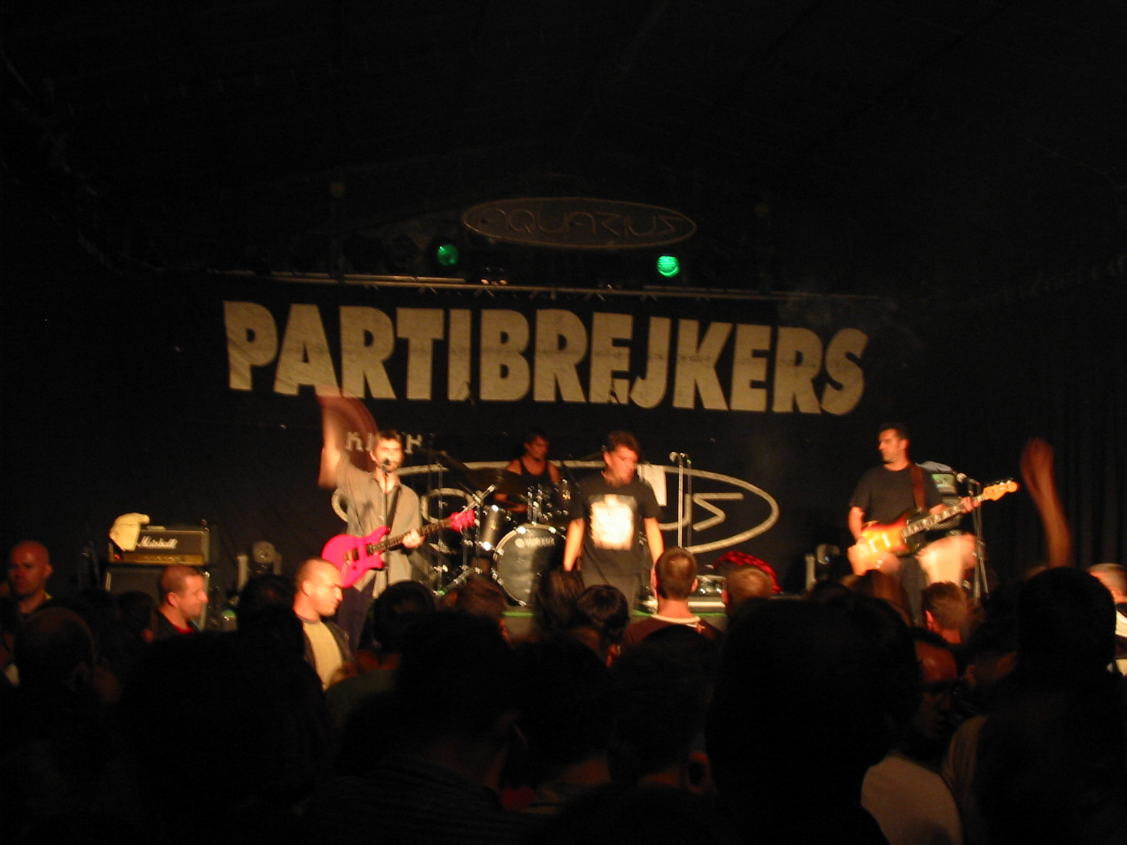 Partibrejkers